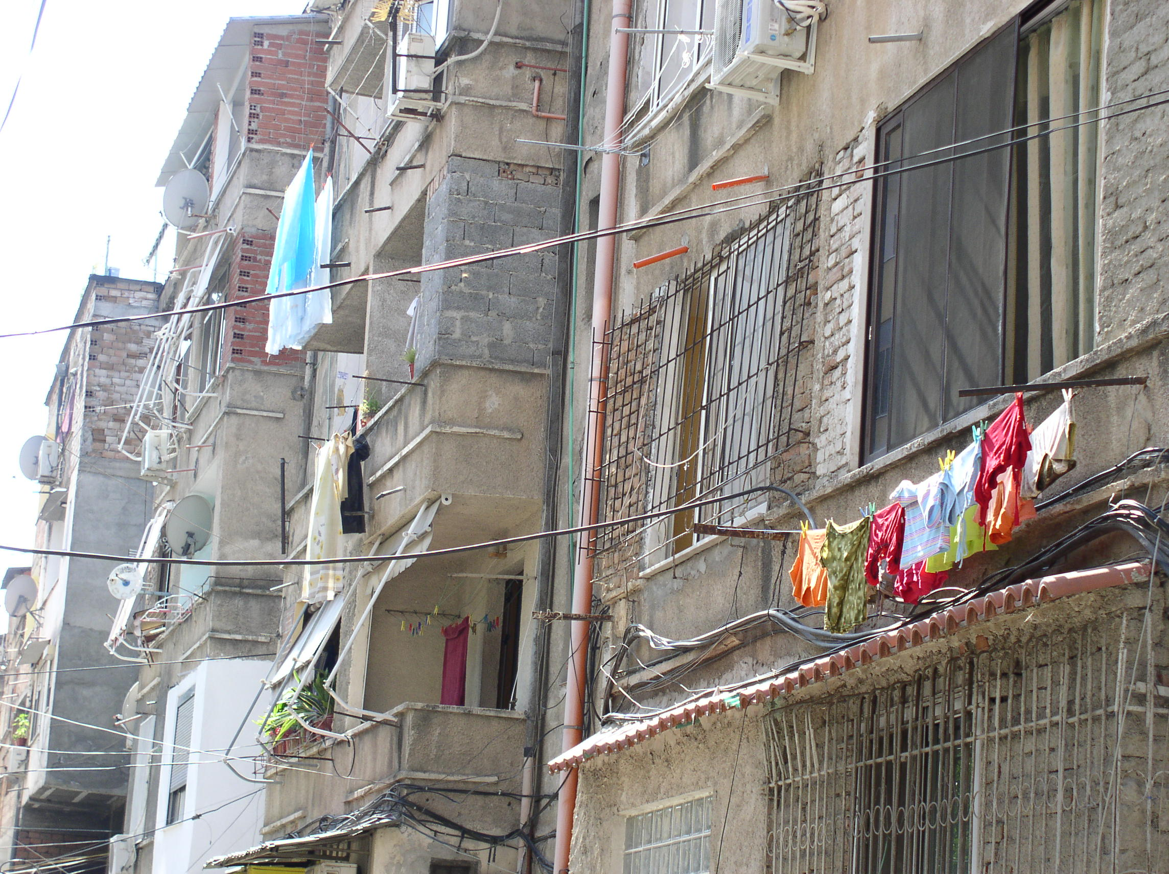 fasada zgrade u Tirani obojene vedrim bojama, sa strane koja se ne vidi sa ulice